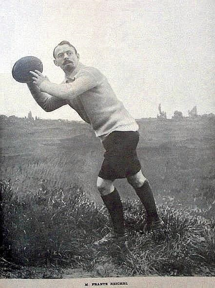 Frantz Reichel 1903.